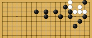 Diagramme du jeu de Go issu de l'ouvrage Igo Hatsuyōron. Problème 43.